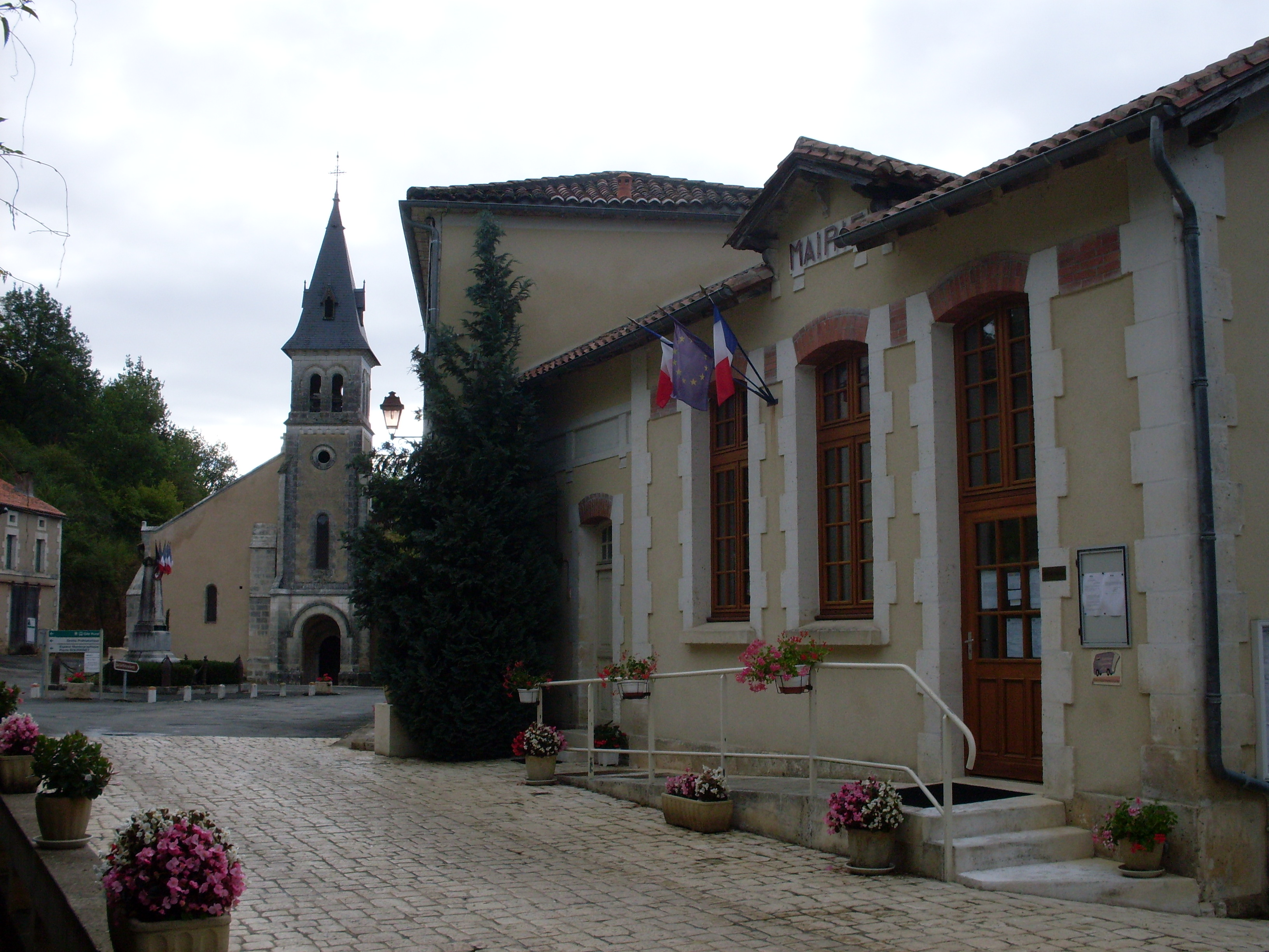 Teyjat, vue d'ensemble de la mairie, la place centrale avec le monument aux morts et l'église.